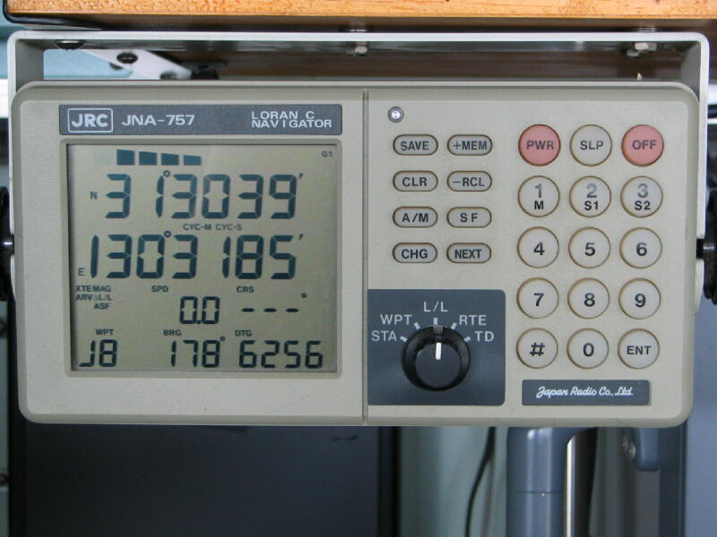 JRC LORAN Receiver JNA-757